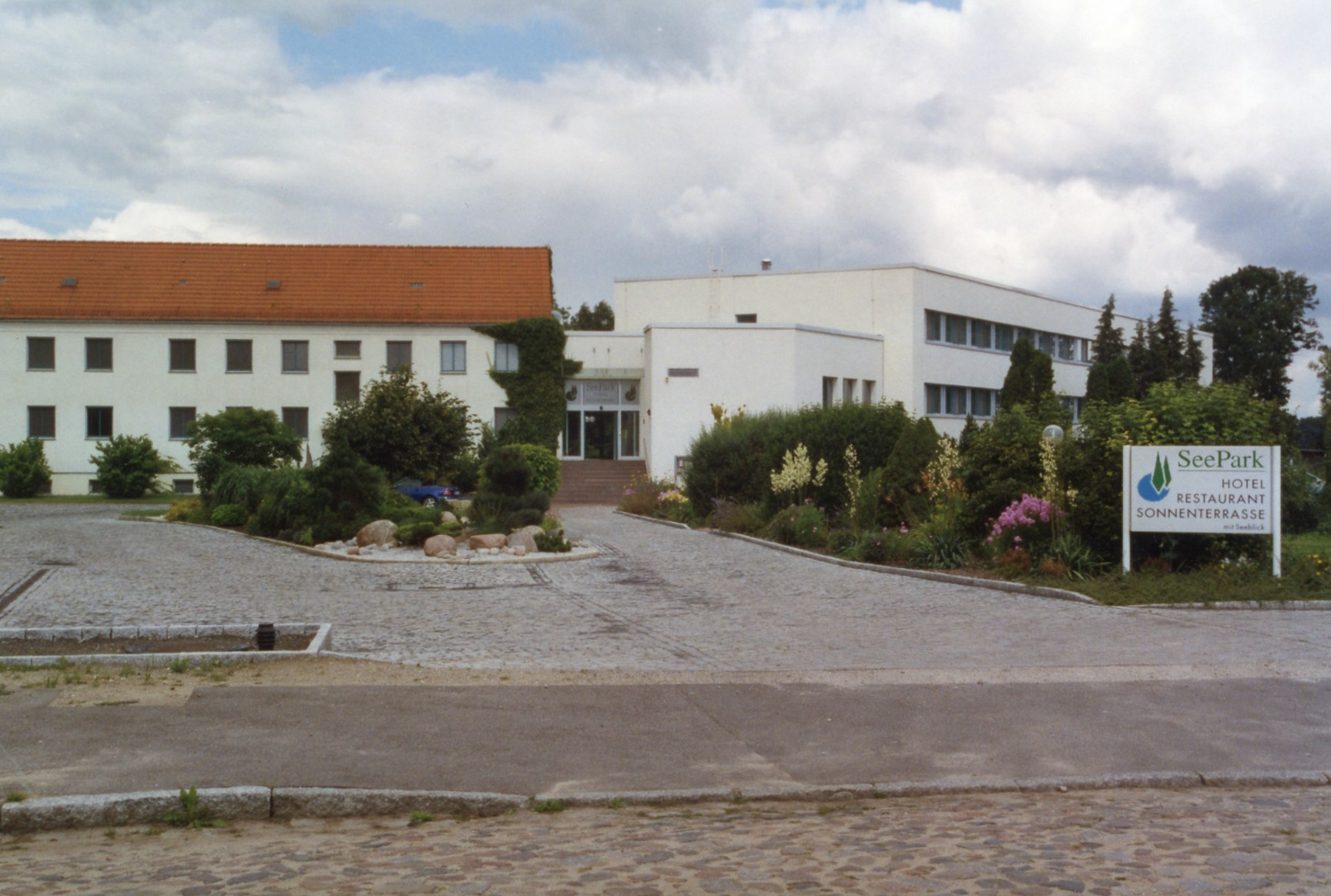 Ortsteil Wandlitz der Gemeinde Wandlitz, "Seepark-Hotel" im Dorfkern